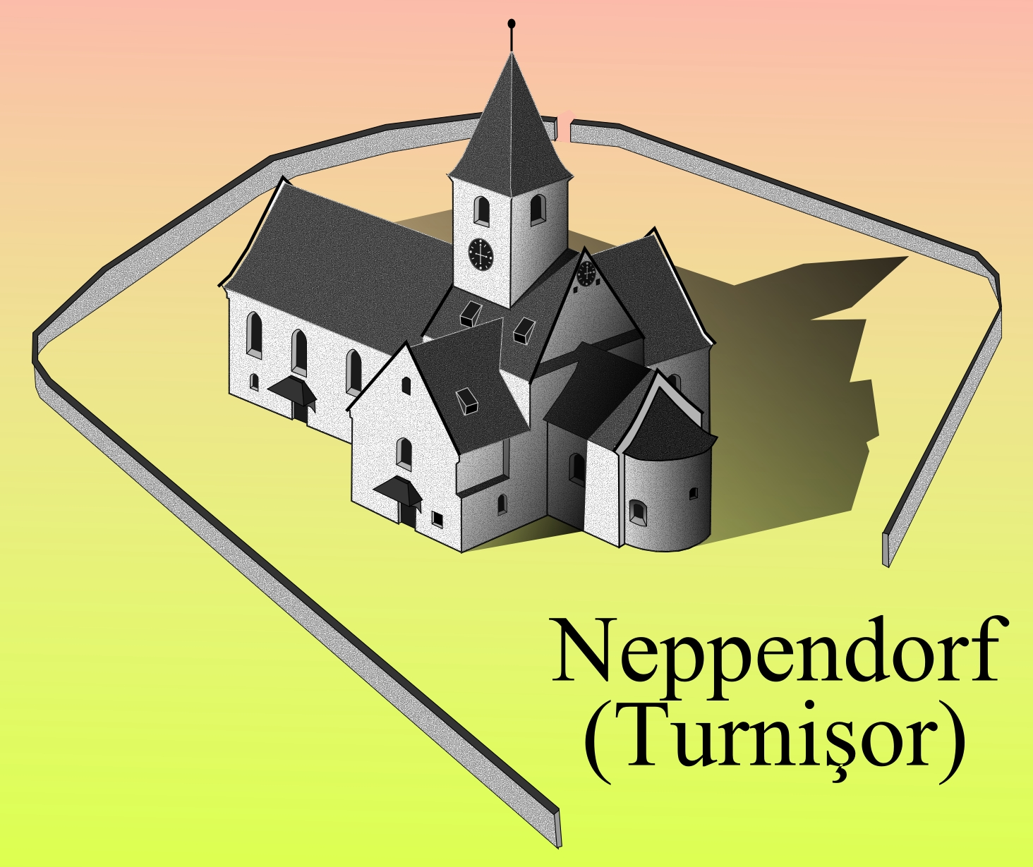 Biserica evanghelica din Turnisor v2.